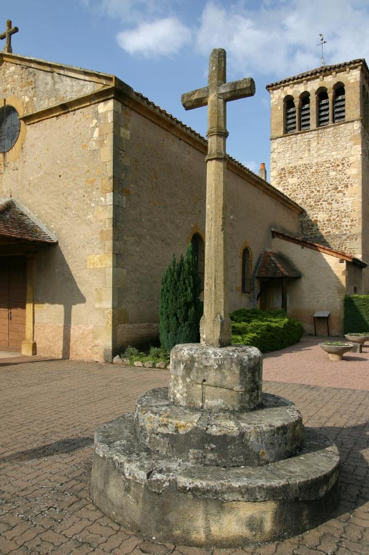 Flanc sud et clocher de l'église de Saint-Martin-du-Lac